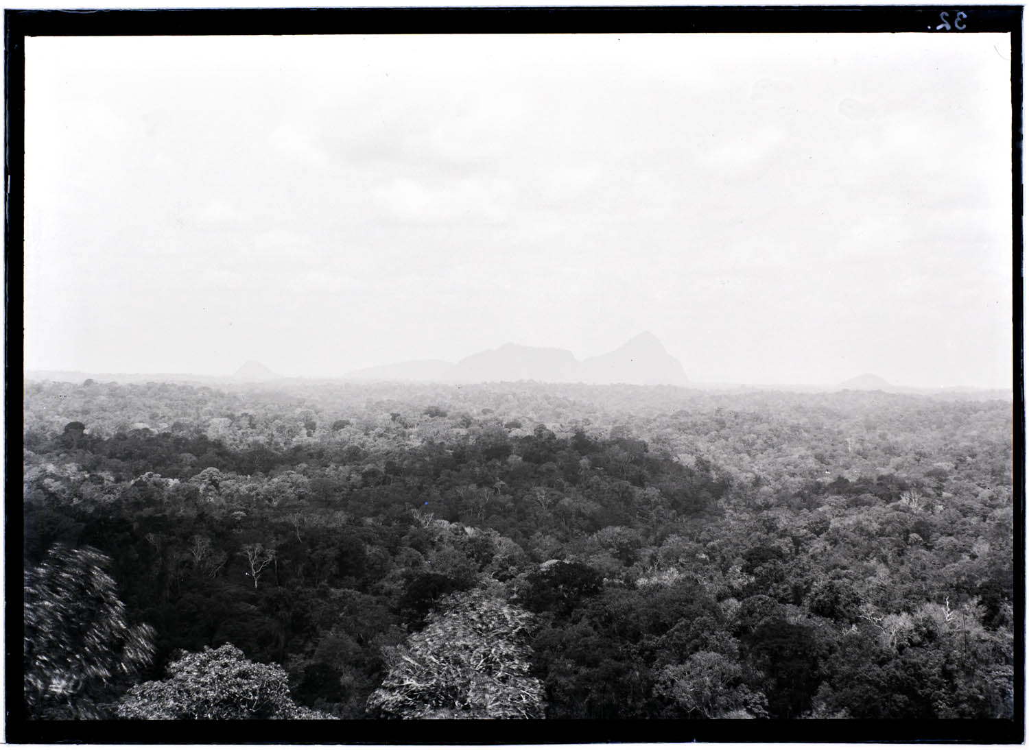 Rosenfeldpiek, gezien van de Magneetrots in Sipaliwini, Suriname